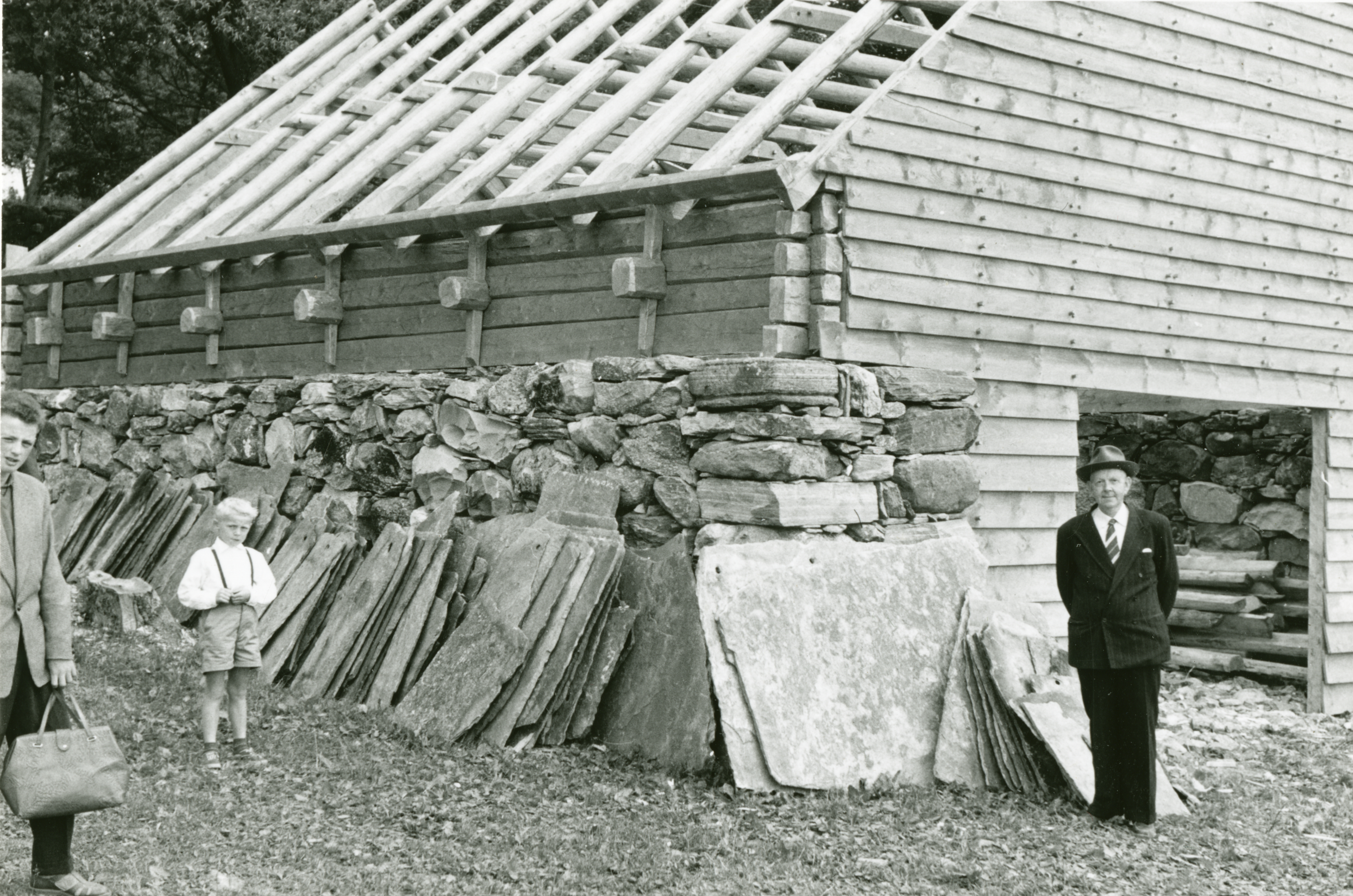 Halsnøy kloster i Eid, Hordaland Naust gjenoppført 1959. Vest for klosteret. This image on crowdsourcing geotagging platform Fotodugnad